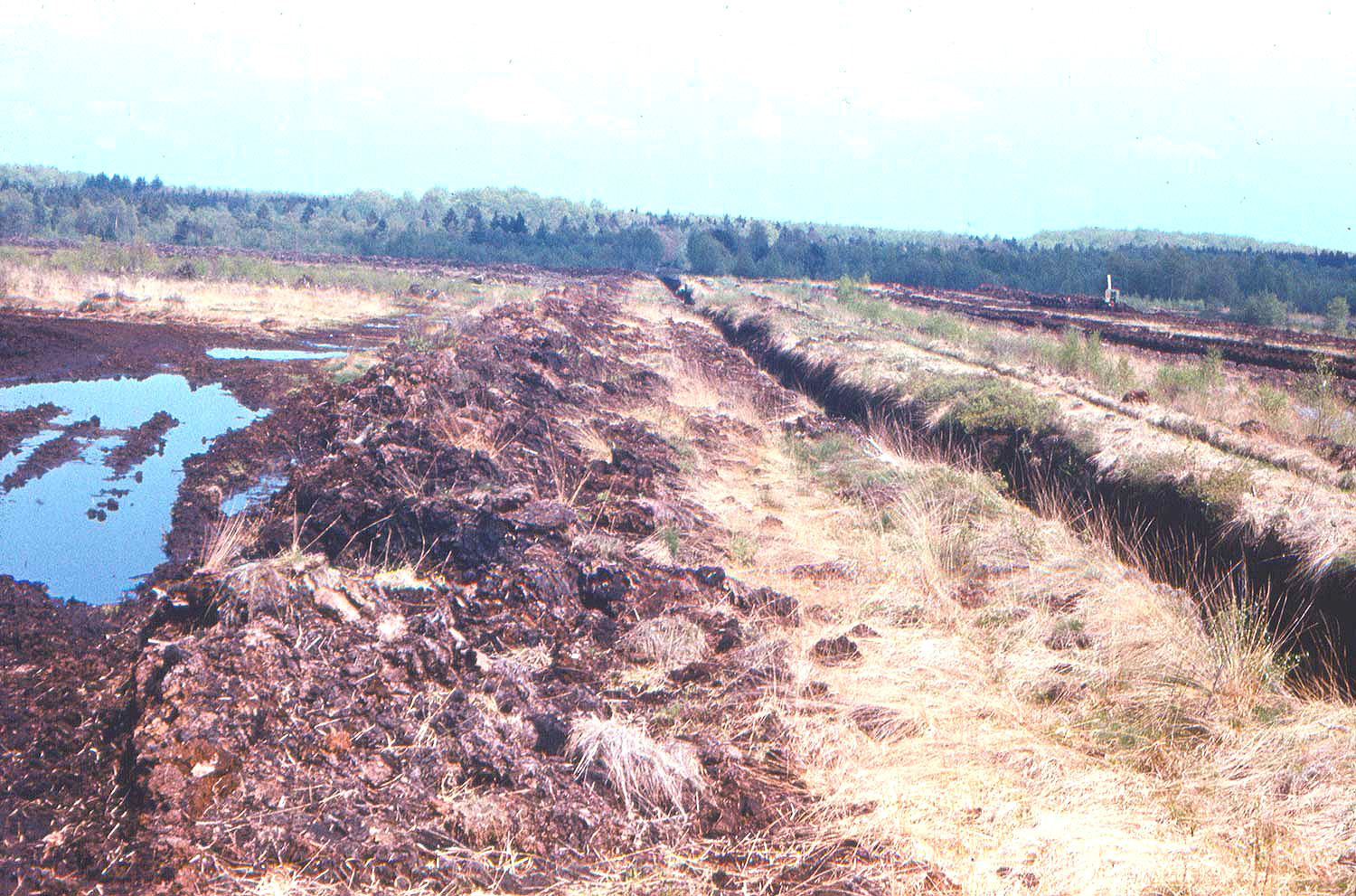 Torfgewinnung in West-Mecklenburg, abgeräumte Fläche, bereit zur Entwässerung